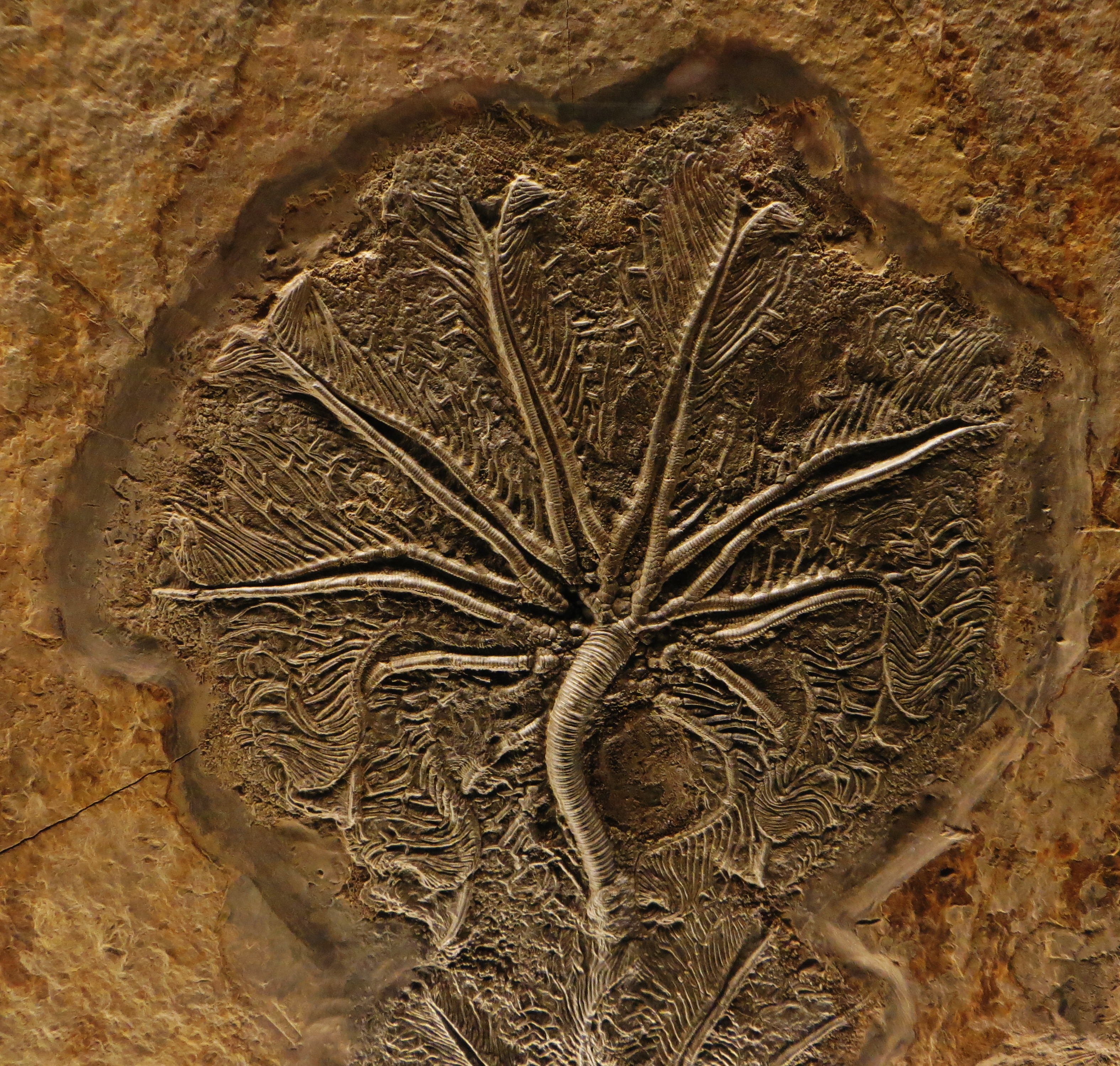 Fossil of crinoid- Took the picture at Natural History Museum, Basel